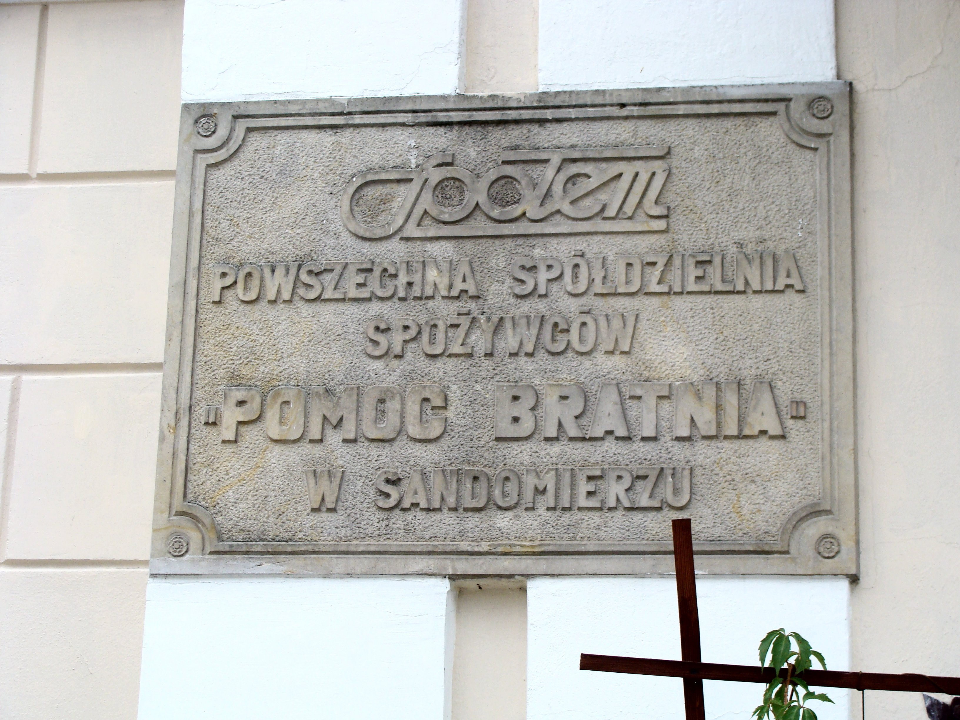 Tablica „Społem Pomoc Bratnia” w Sandomierzu.